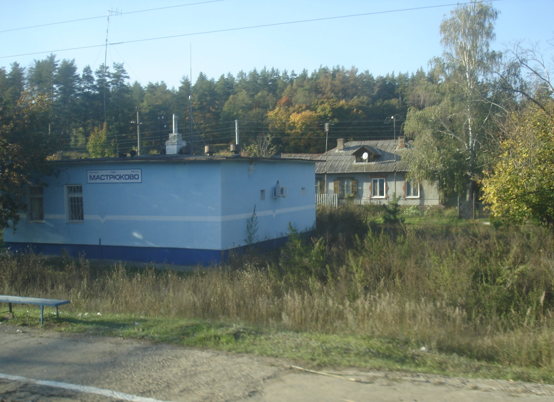 ЖД-станция Мастрюково, станционное сооружение